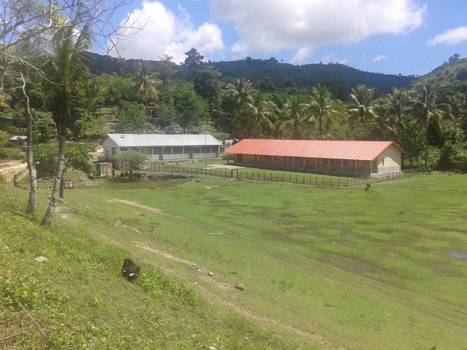 Leohito